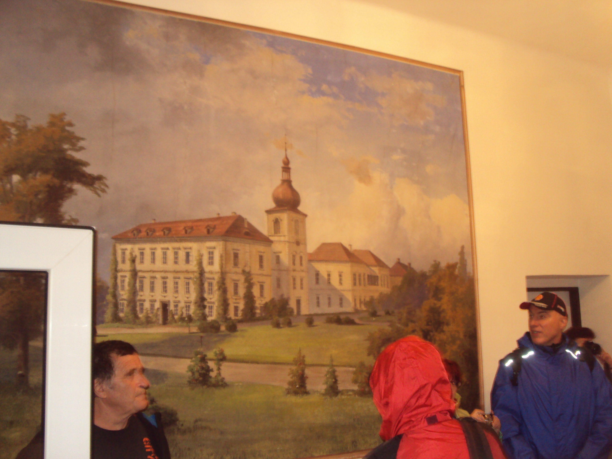 Česky: Turisté v maličké Hraběcí zastávce, malinká místnost na nádraží s vchodem z peronu, s dvěma obrazy